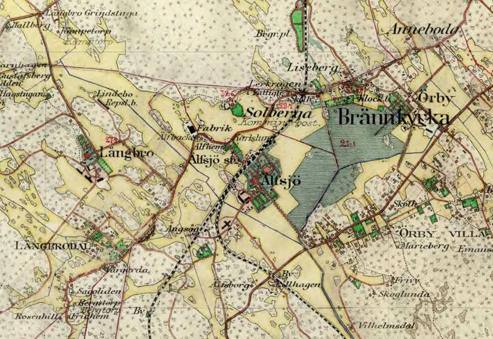 Del av Brännkyrka J112-75-19, Häradsekonomiska kartan, med Brännkyrka Älvsjö Långbro